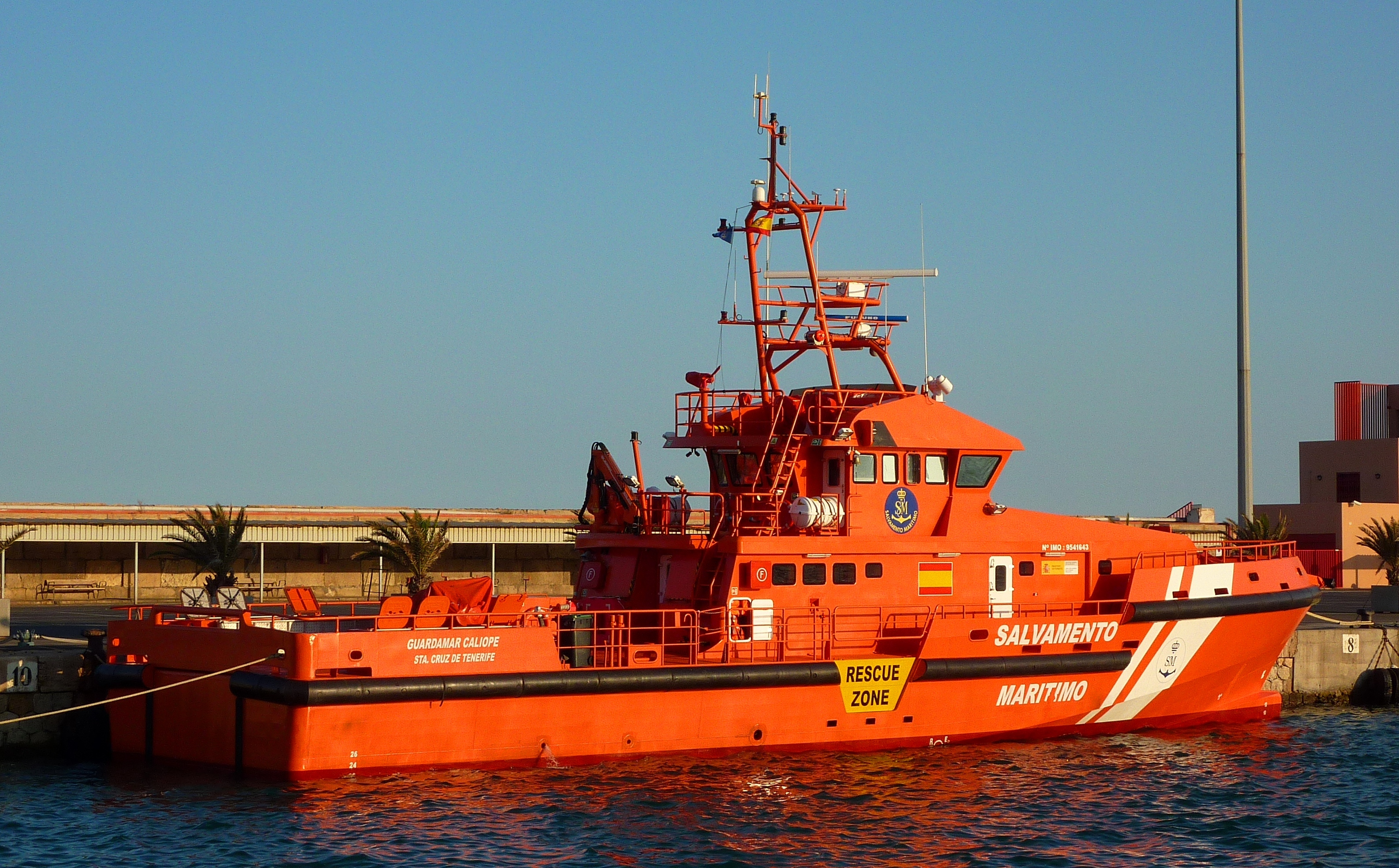 Embarcación de Intervención Rápida clase Guardamar "Guardamar Calíope", G-40 de la Sociedad Estatal de Salvamento y Seguridad Marítima.